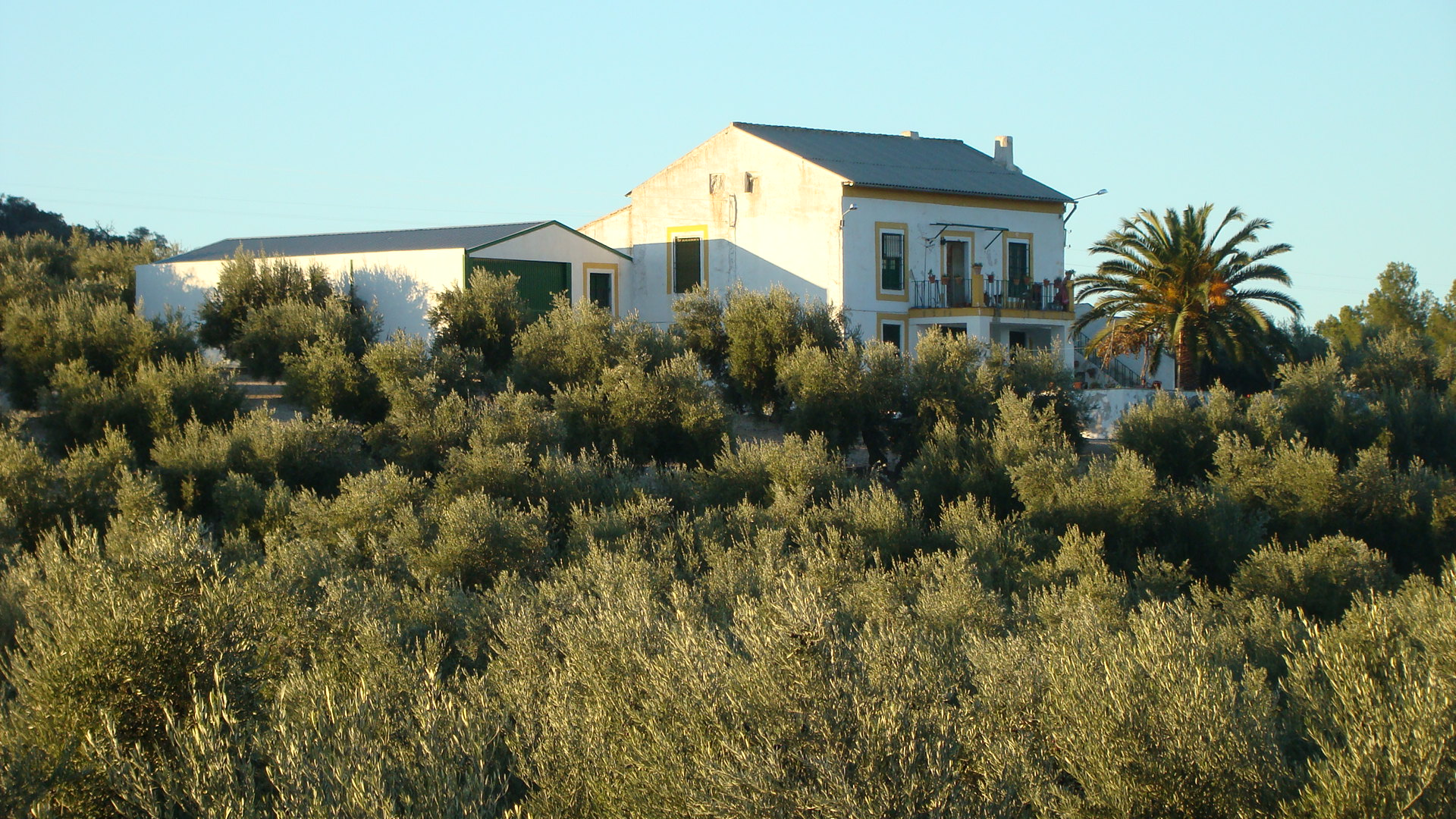 Casería de Olivar en la carretera de Úbeda (Jaén - España)